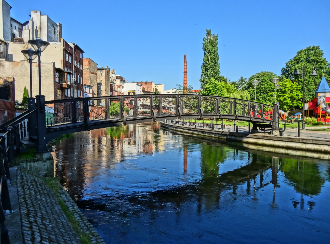 Kładka dla pieszych nad Młynówką w rejonie Wenecji Bydgoskiej, prowadząca z Wyspy Młyńskiej do ulicy Długiej w Bydgoszczy